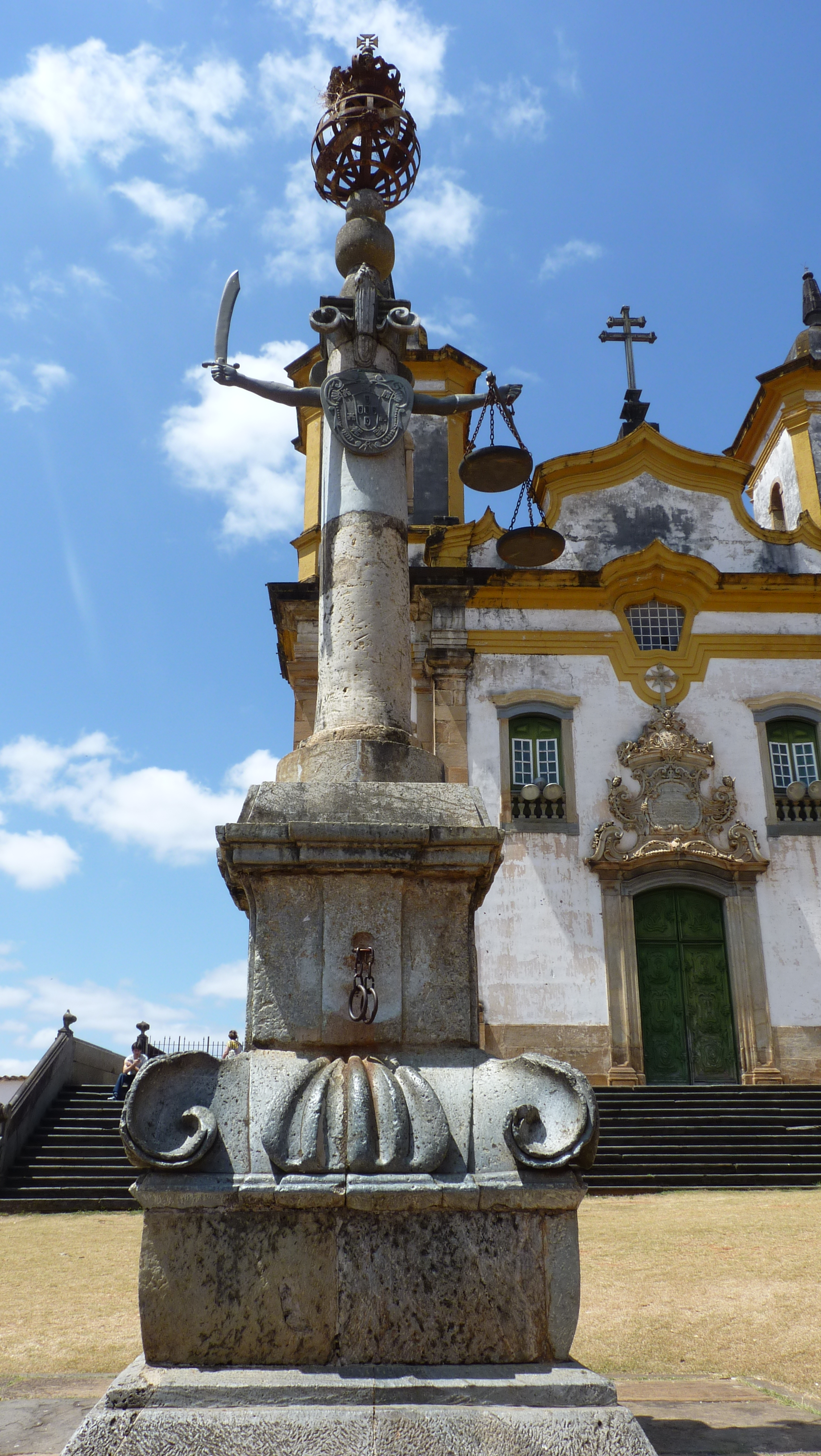 Mariana, MG: conjunto arquitetônico e urbanístico